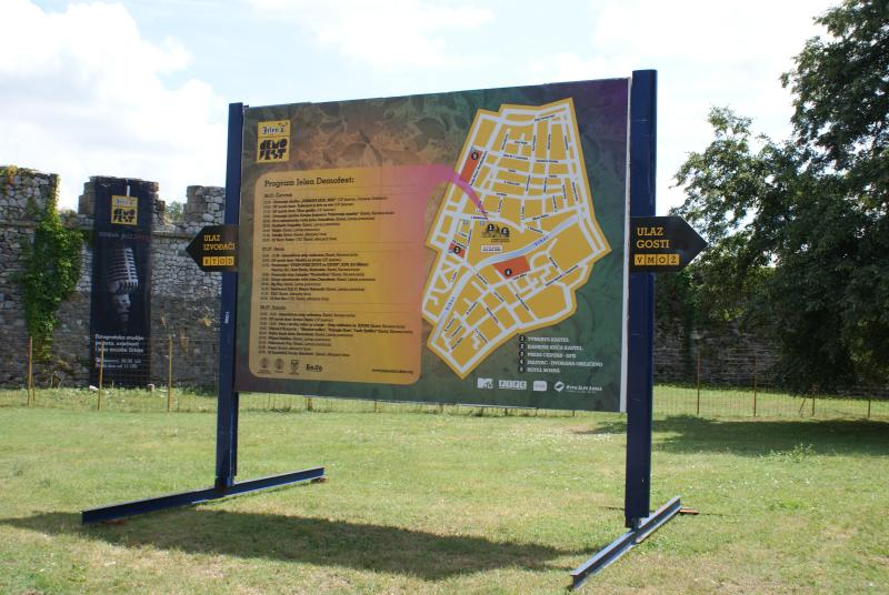 Setting up